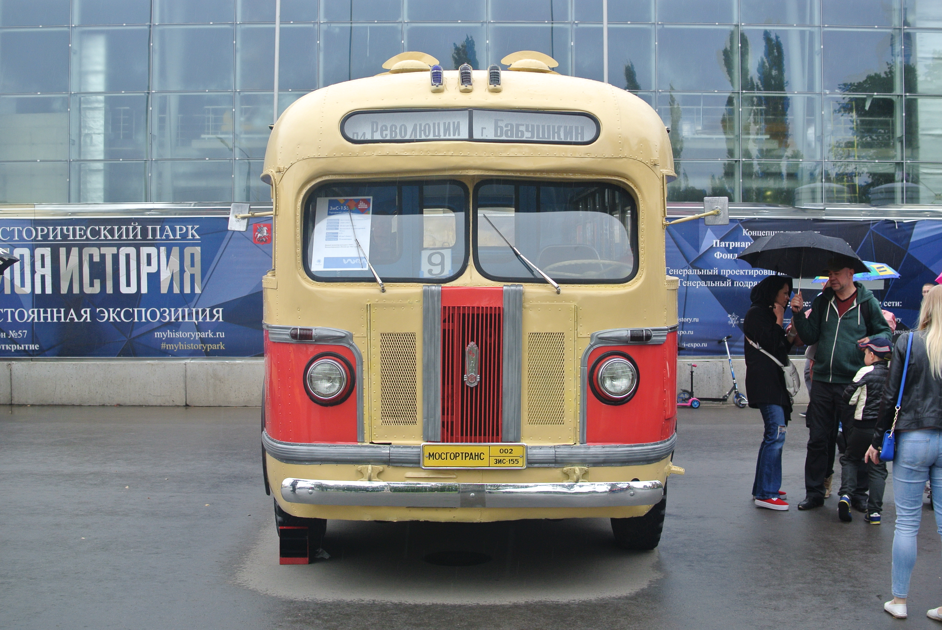 Автобус ЗиС-155 на экспозиции Мосгортранс на ВВЦ